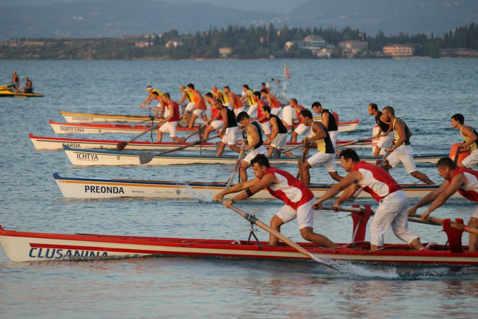 Bisse al via della gara